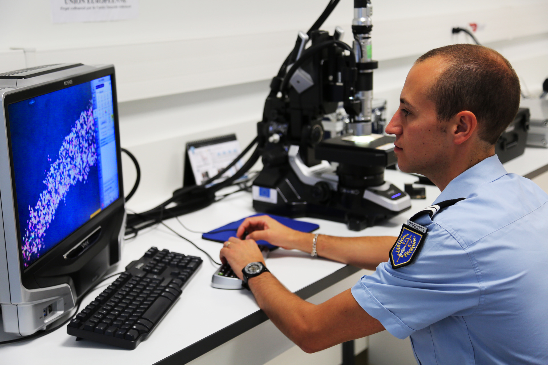 Comparaison de cartouches d'encre